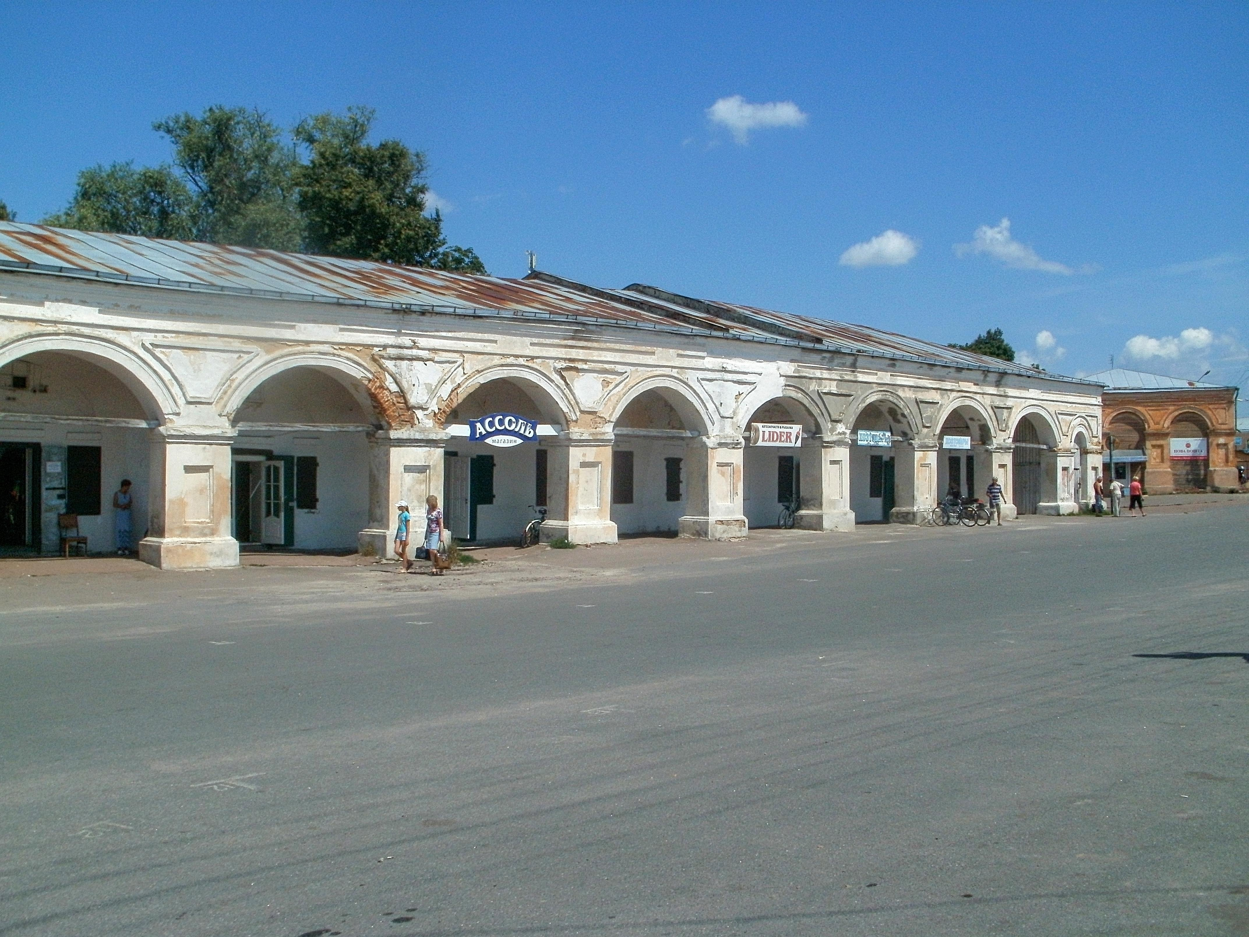 Західний корпус торгових рядів (мур.), Новгород-Сіверський, вул.50-річчя Жовтня, 4